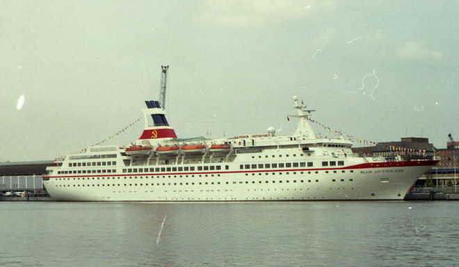 am Bollhörnkai.